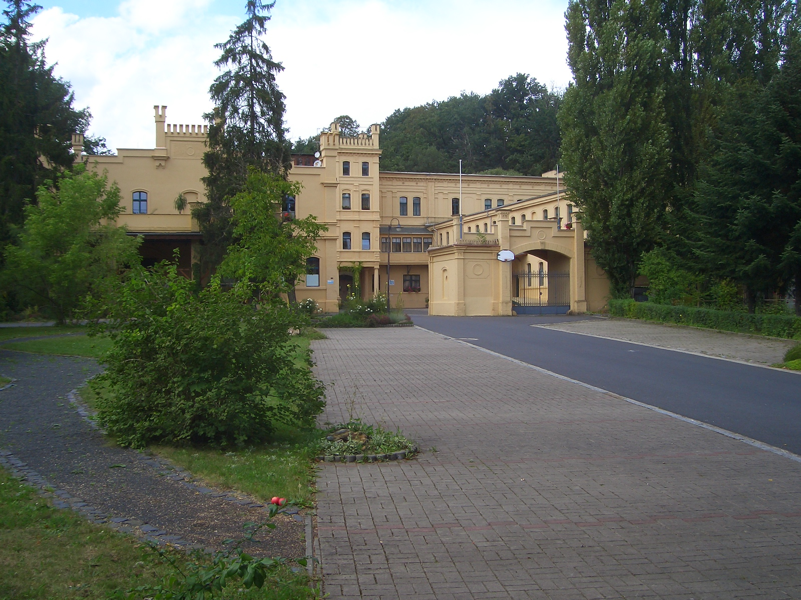 Verwaltungsgebäude (Hauptkontor) der Flachsspinnerei errichtet in den Jahren 1880 bis 1882 als Büro für die kaufmännische Verwaltung inclusive Lithografenanstalt, die um 1890 durch ein Fotoatelier abgelöst wurde neben der Funktion als Verwaltung diente das Objekt bis um die 1970er Jahre als Lager für Roh- und Fertigware 1952 Integration einer Betriebsberufsschule nach 1960 Schaffung eines Internats 1991 Beendigung der betrieblichen Ausbildung, Schließung des Internats 1991 Übernahme durch den Internationalen Bund für Sozialarbeit (IB), Nutzung als Bildungsstätte 1995 bis 1998 umfassende Rekonstruktion